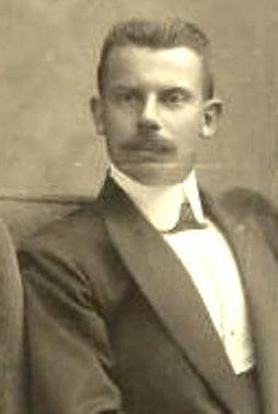 Hanaman Ferenc